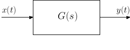 Diagrama de bloques con una entrada, una salida y una función de transferencia